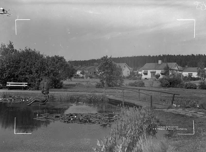 Hagaparken.; Miljöer; Stadsmiljö